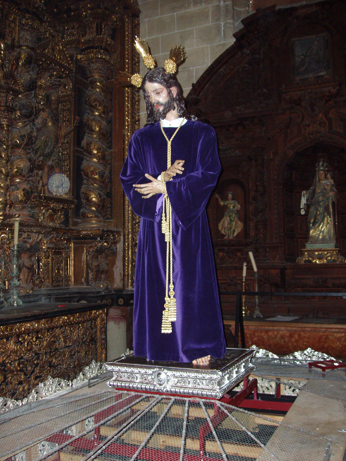 Dolor y Sacrificio en El Puerto de Santa María.